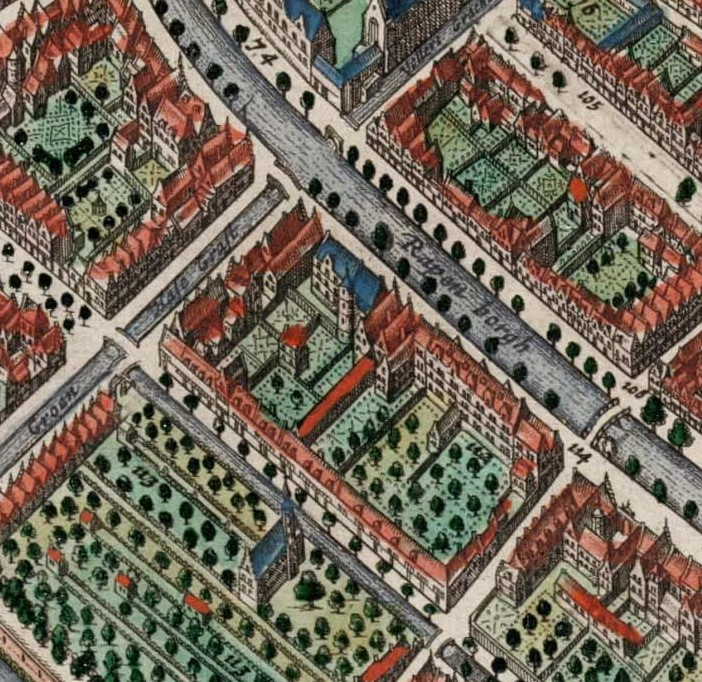 Deel van Leiden waar het klooster Roma gestaan heeft